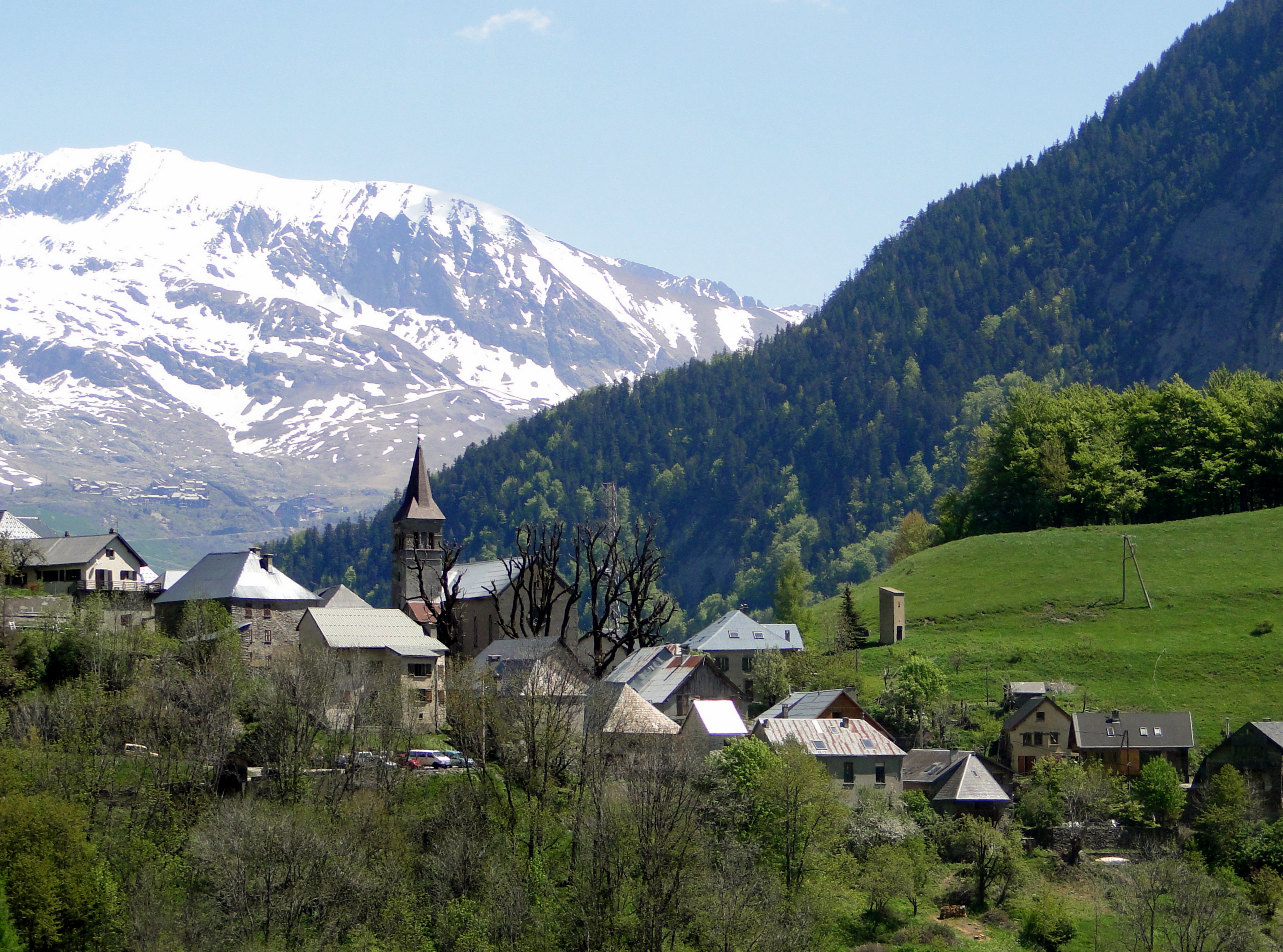 Village d'Ornon, commune de l'Oisans